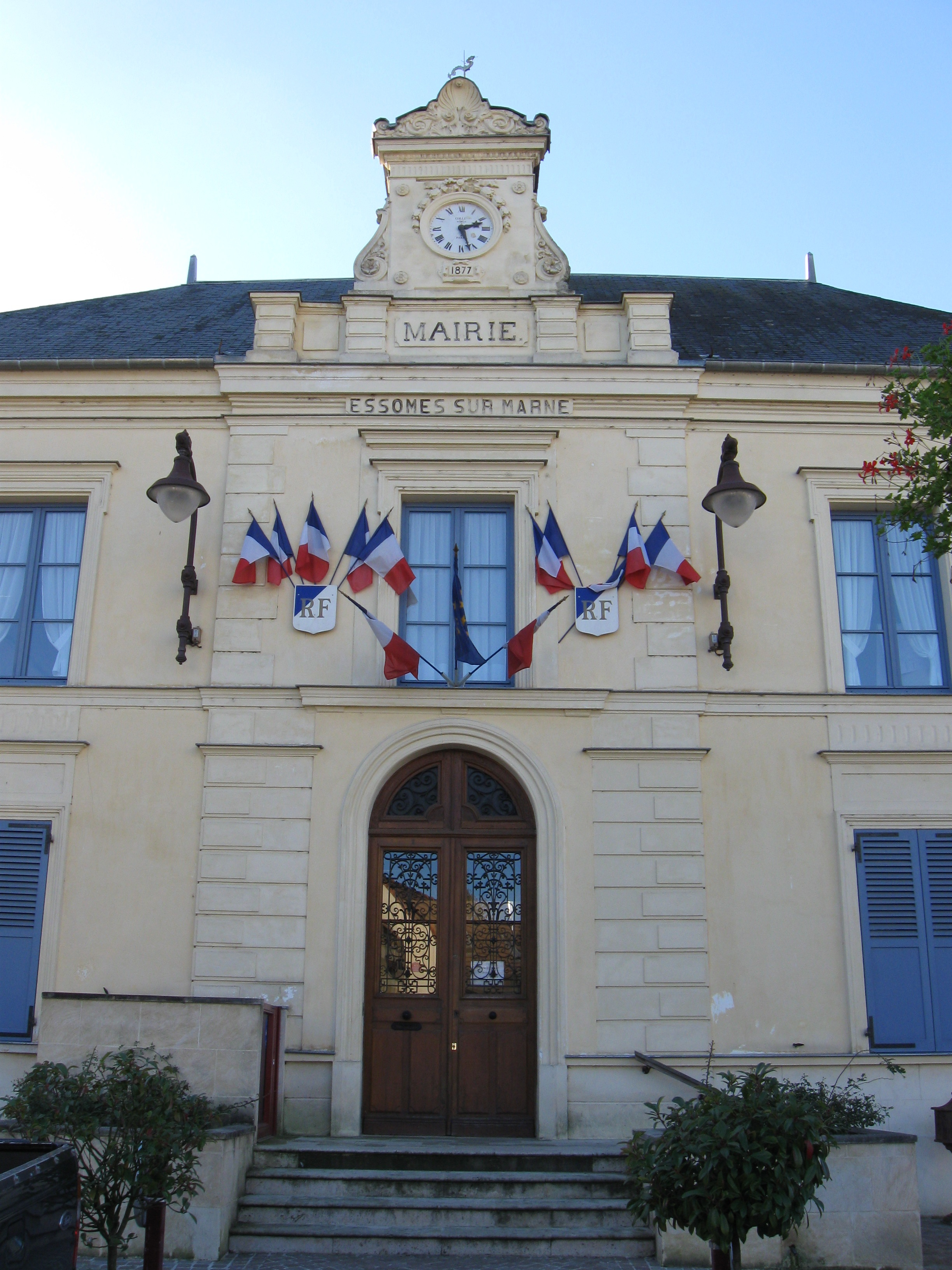 Mairie d'Essômes-sur-Marne. (département de l'Aisne, région Picardie).